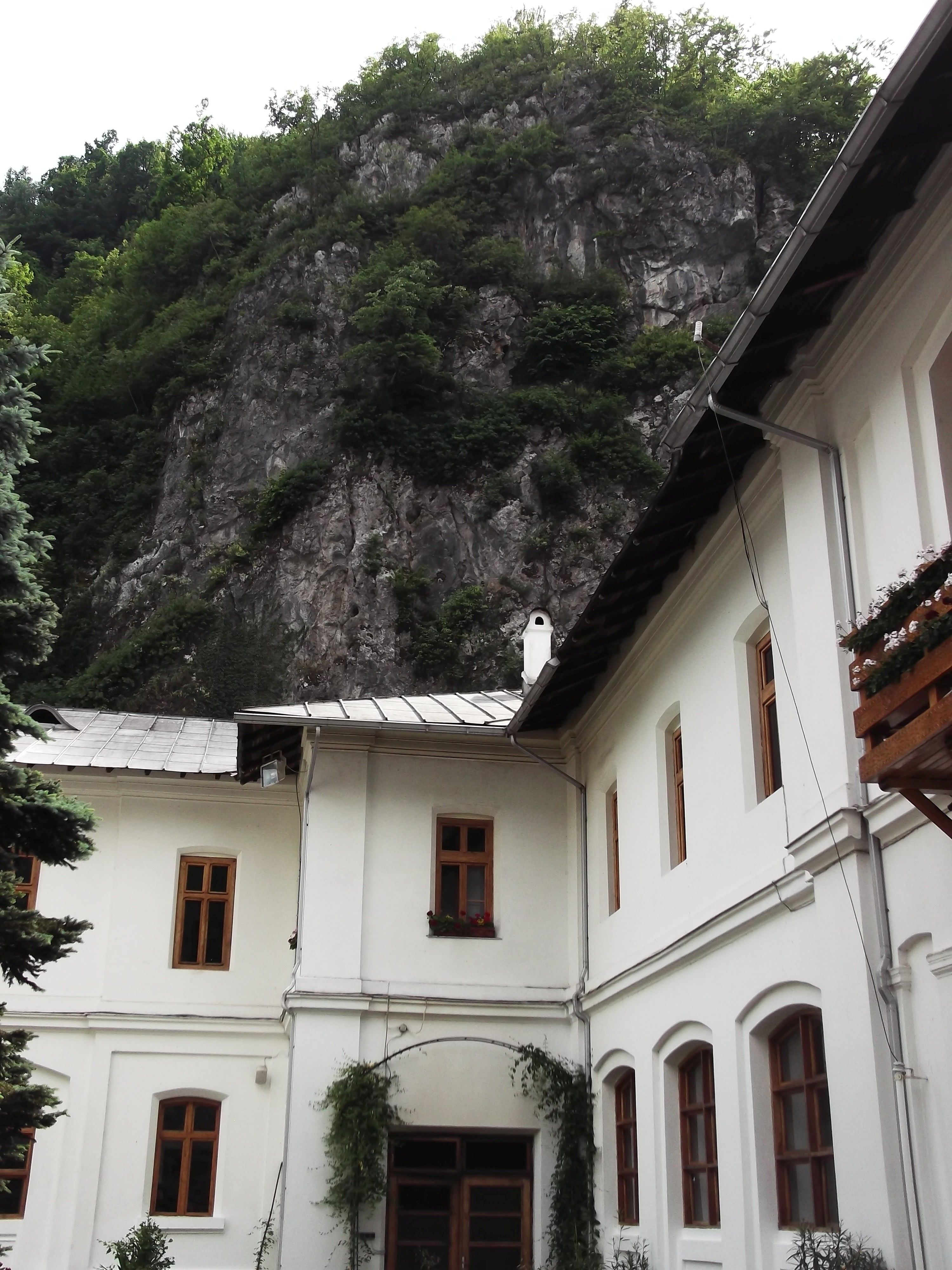 Mănăstirea Tismana: chilii 05